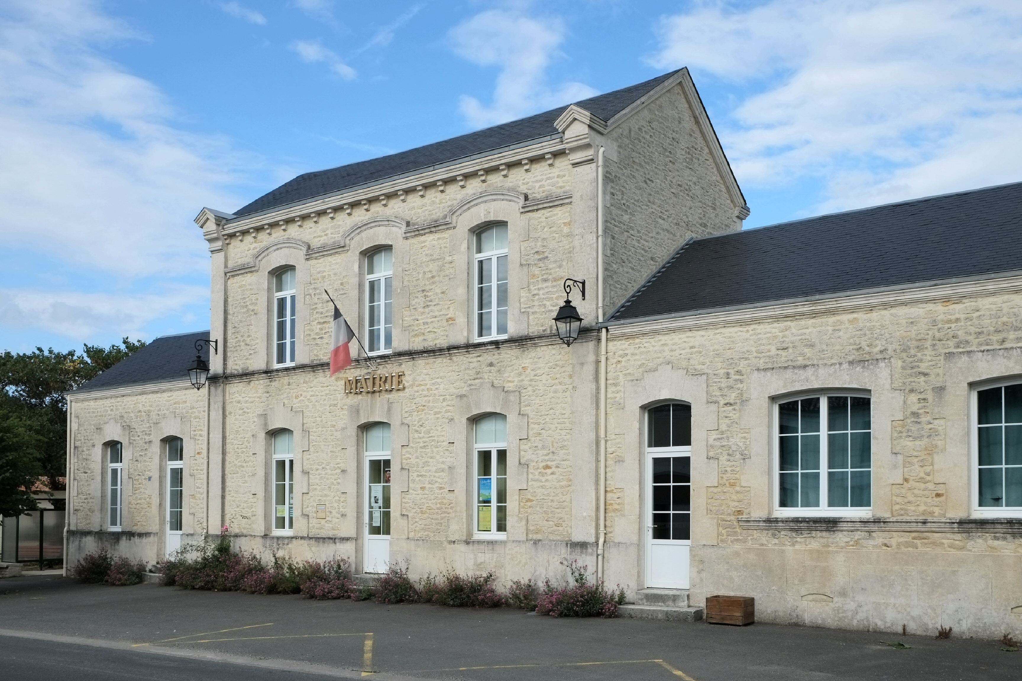 Mairie Thors Charente-Maritime France